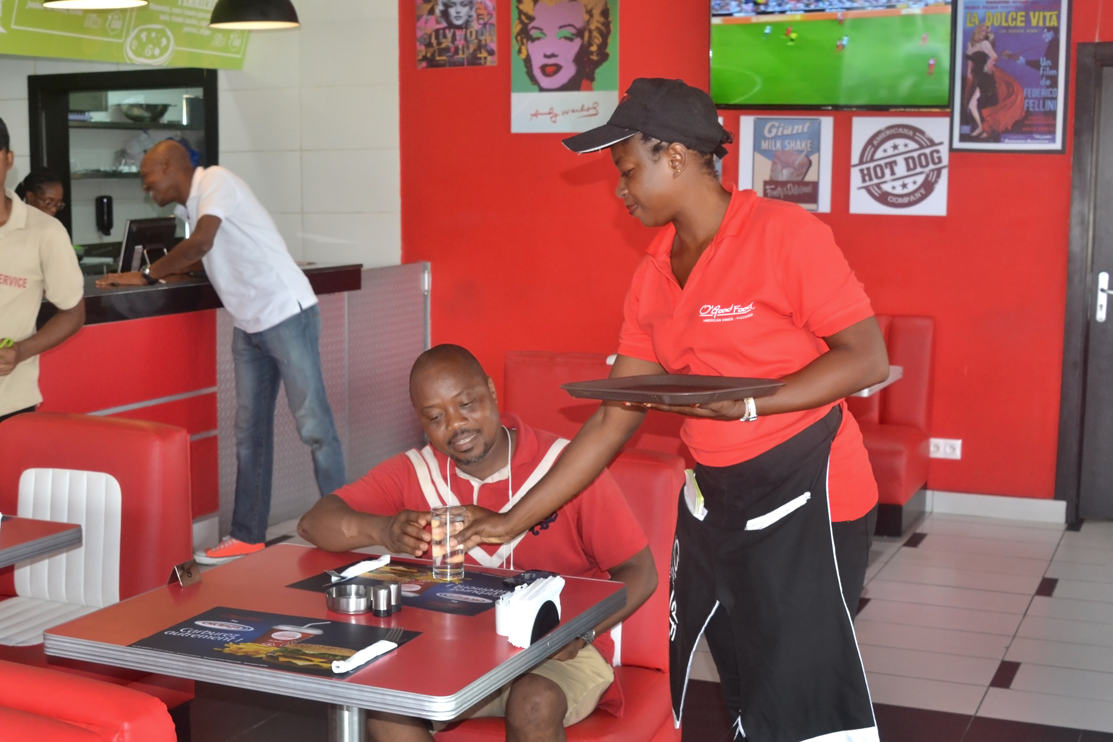 une serveuse dans un restaurant d'Abidjan This is an image of "African people at work" from Ivory Coast